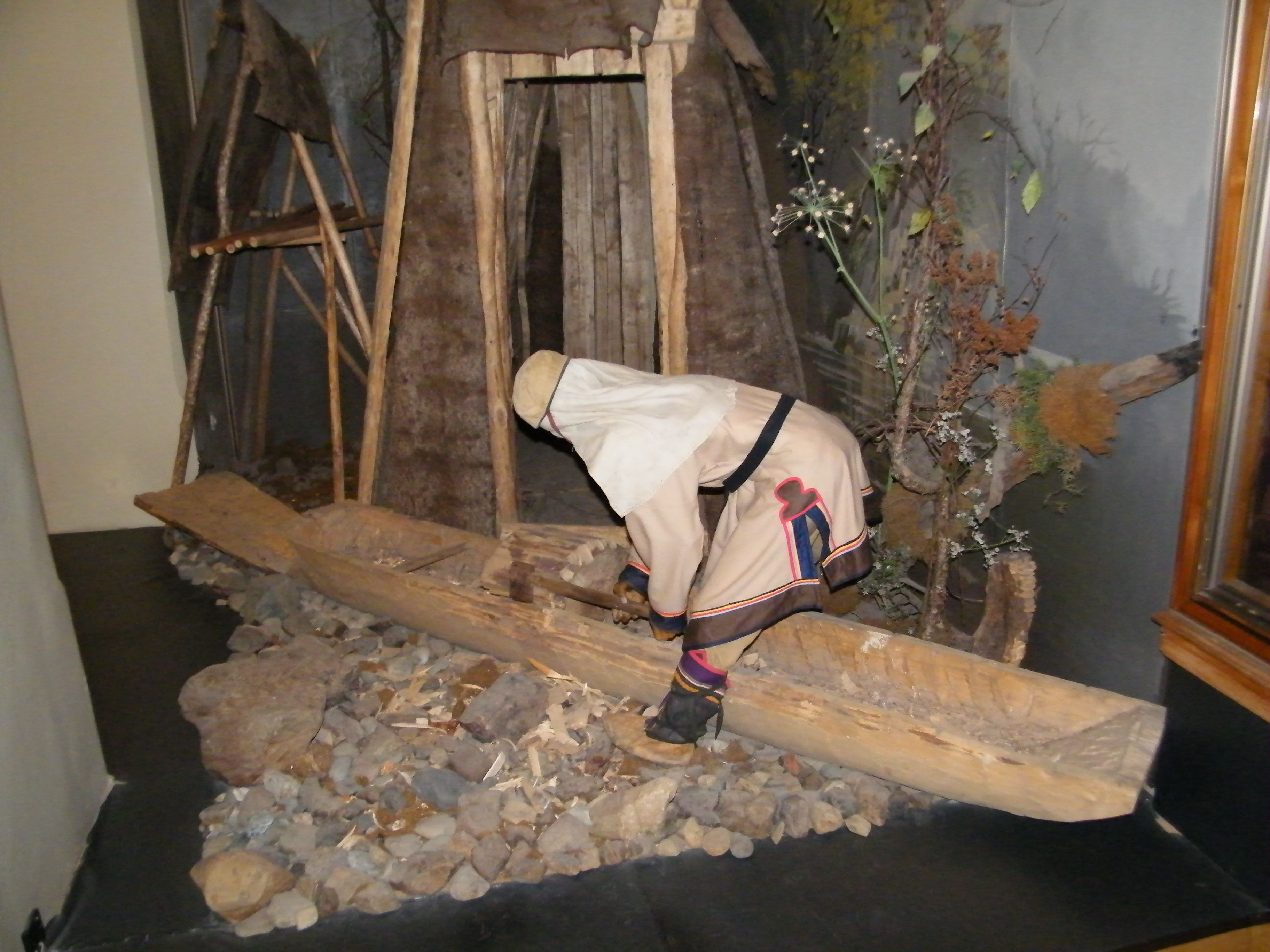 Удэгеец строит бат